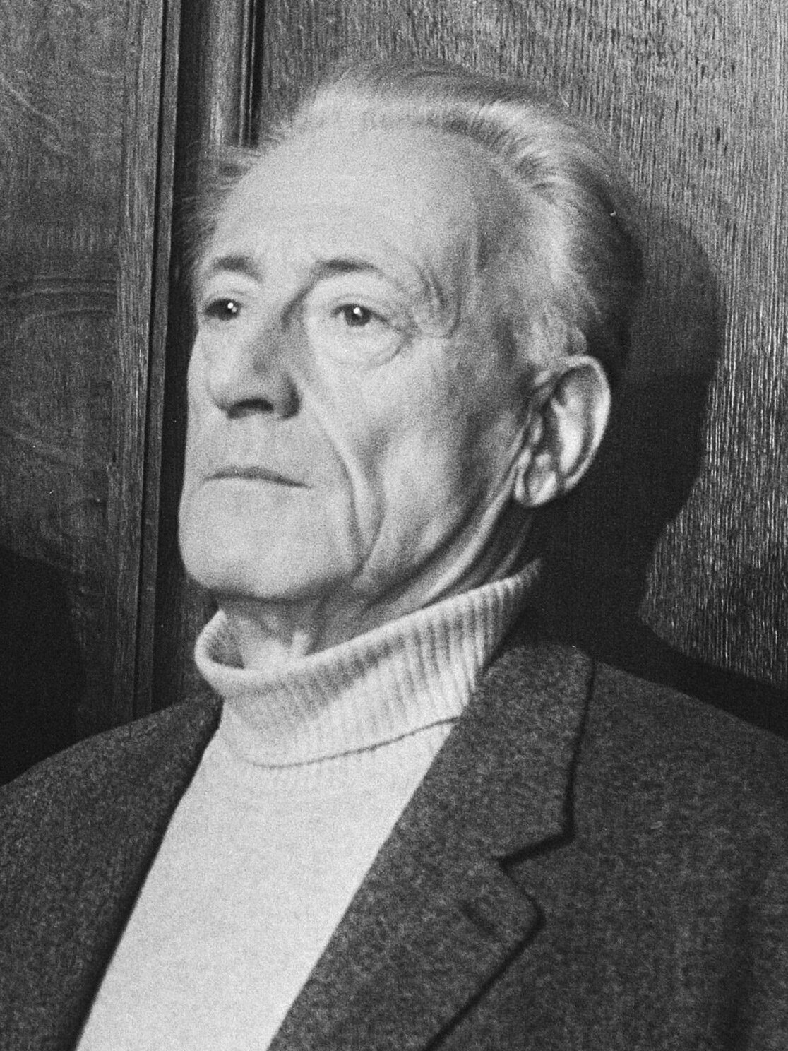 Discussiebijeenkomst in de aula van de Oude Lutherse Kerk te Amsterdam met Henri Lefebvre